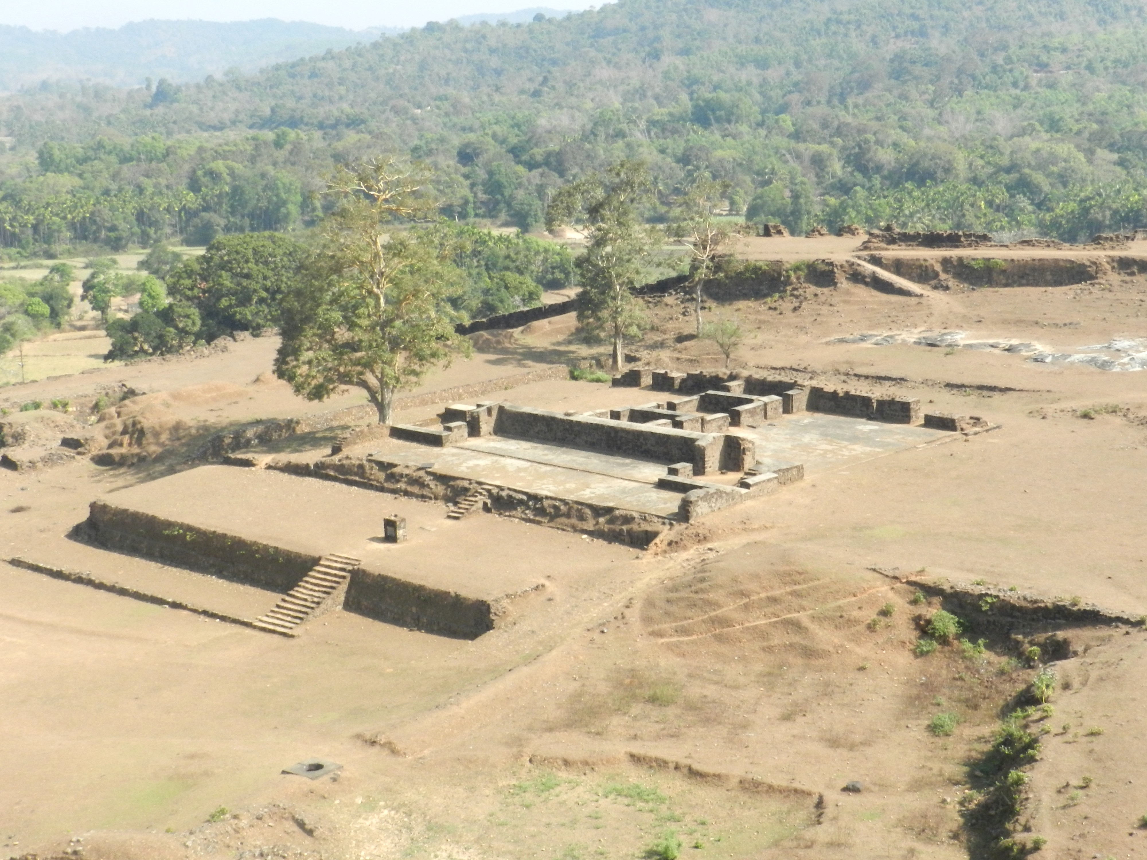 ಕನ್ನಡ: ಕೋಟೆಯೊಳಗಿನ ಅರಮನೆಯ ಅವಶೇಷಗಳು